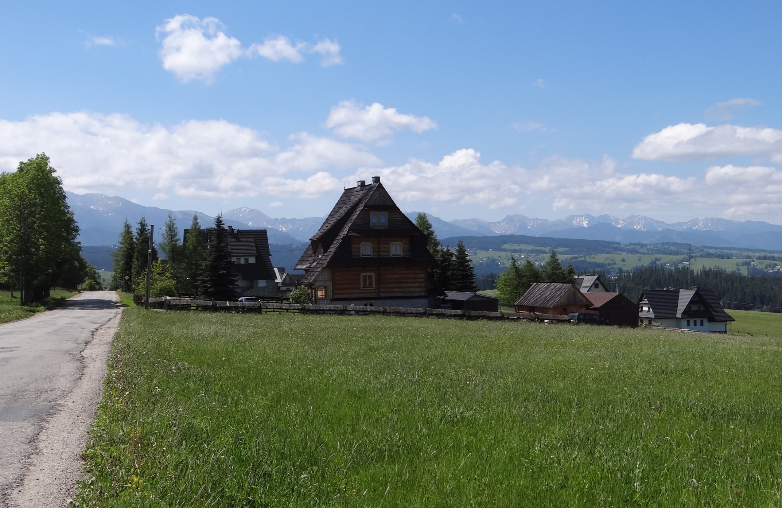 Fragment wsi Bustryk